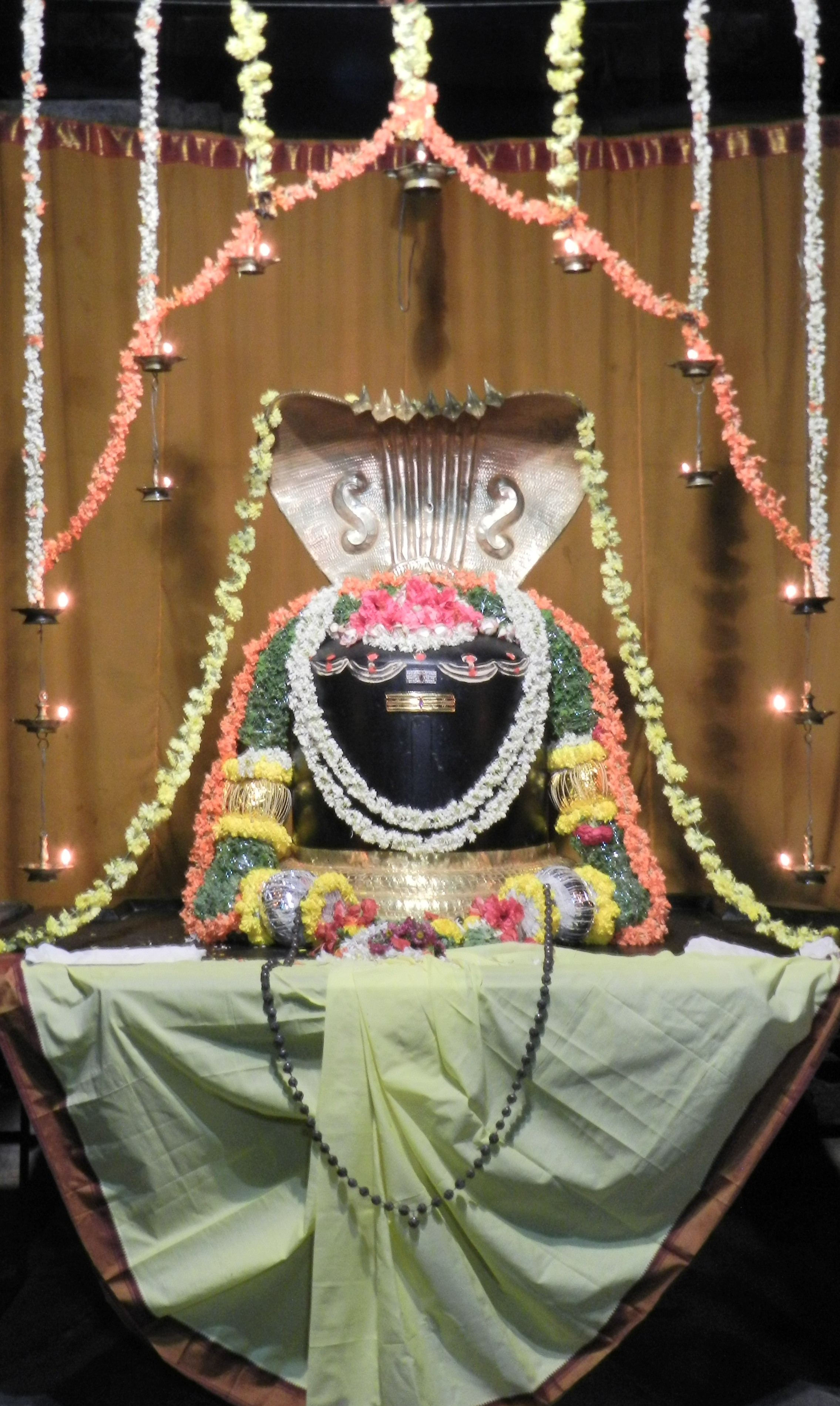 ಕನ್ನಡ: ಹೊಯ್ಸಳೇಶ್ವರ ಮೂಲ ವಿಗ್ರಹ (ಶಿವಲಿಂಗ)